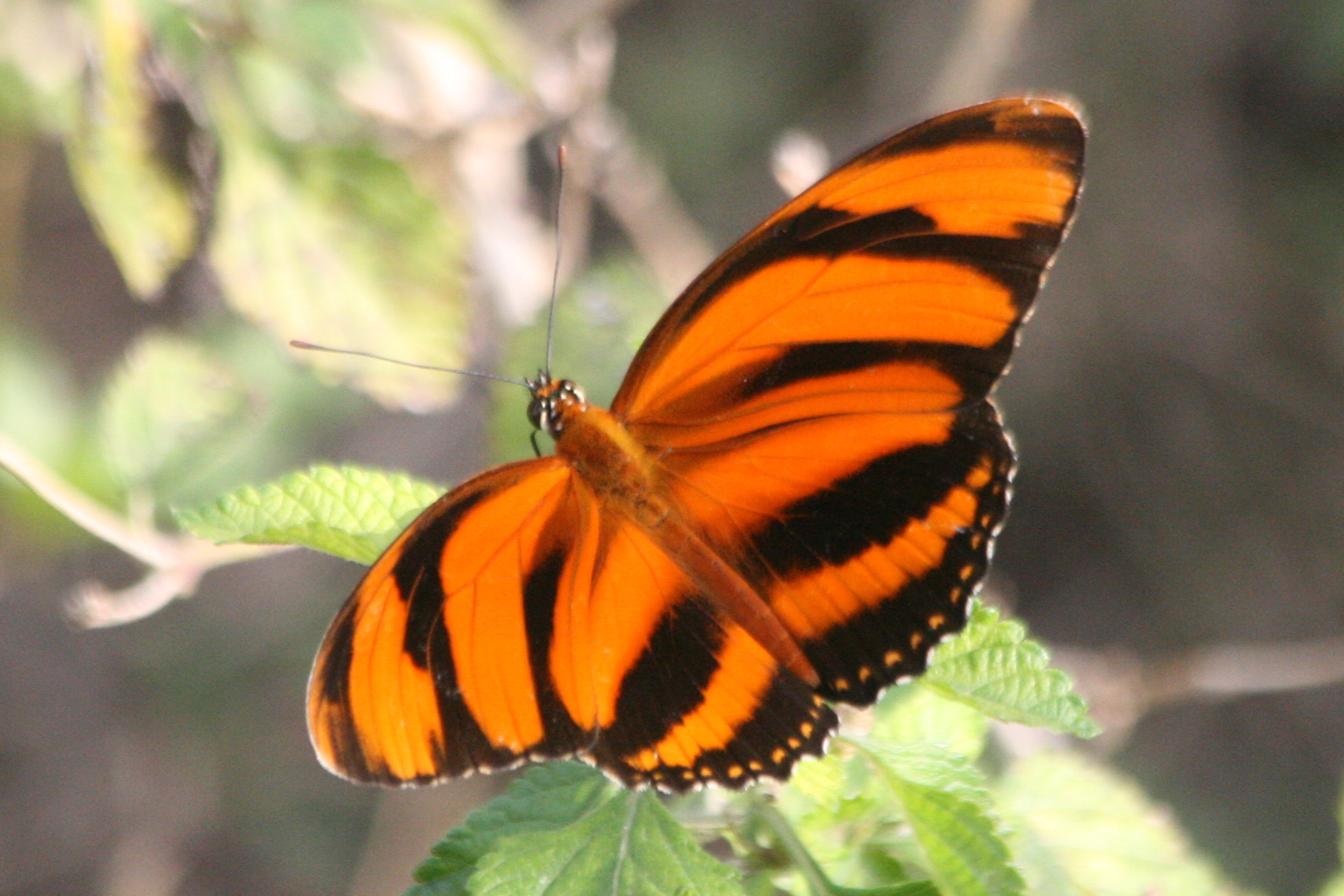 Dryadula phaetusa